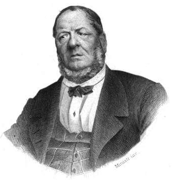 Pietro Betti